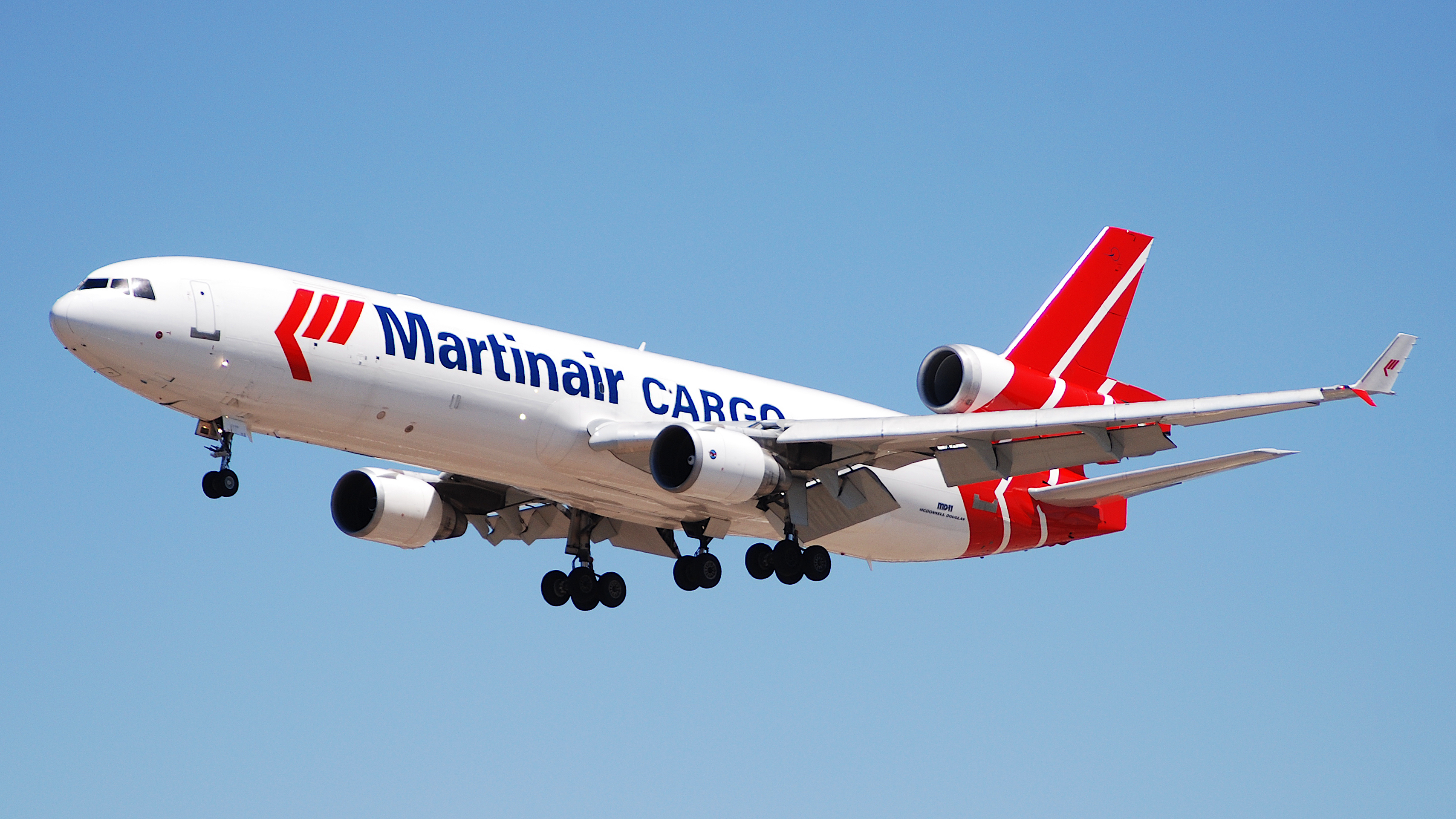 PH-MCY@LAX;18.04.2007/463md